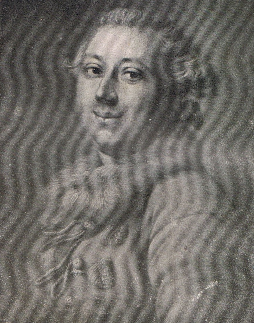 Ölportrait von Georg David Matthieu